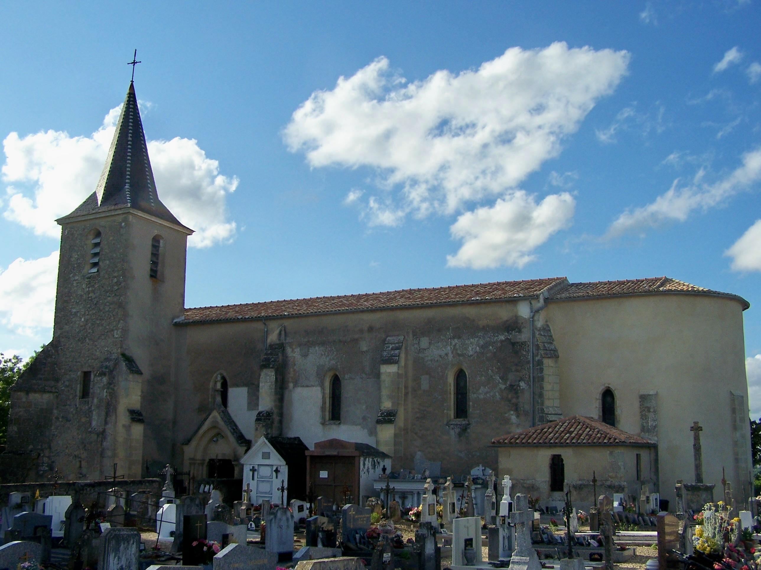 Église Saint-Michel de Puybarban, Gironde, France